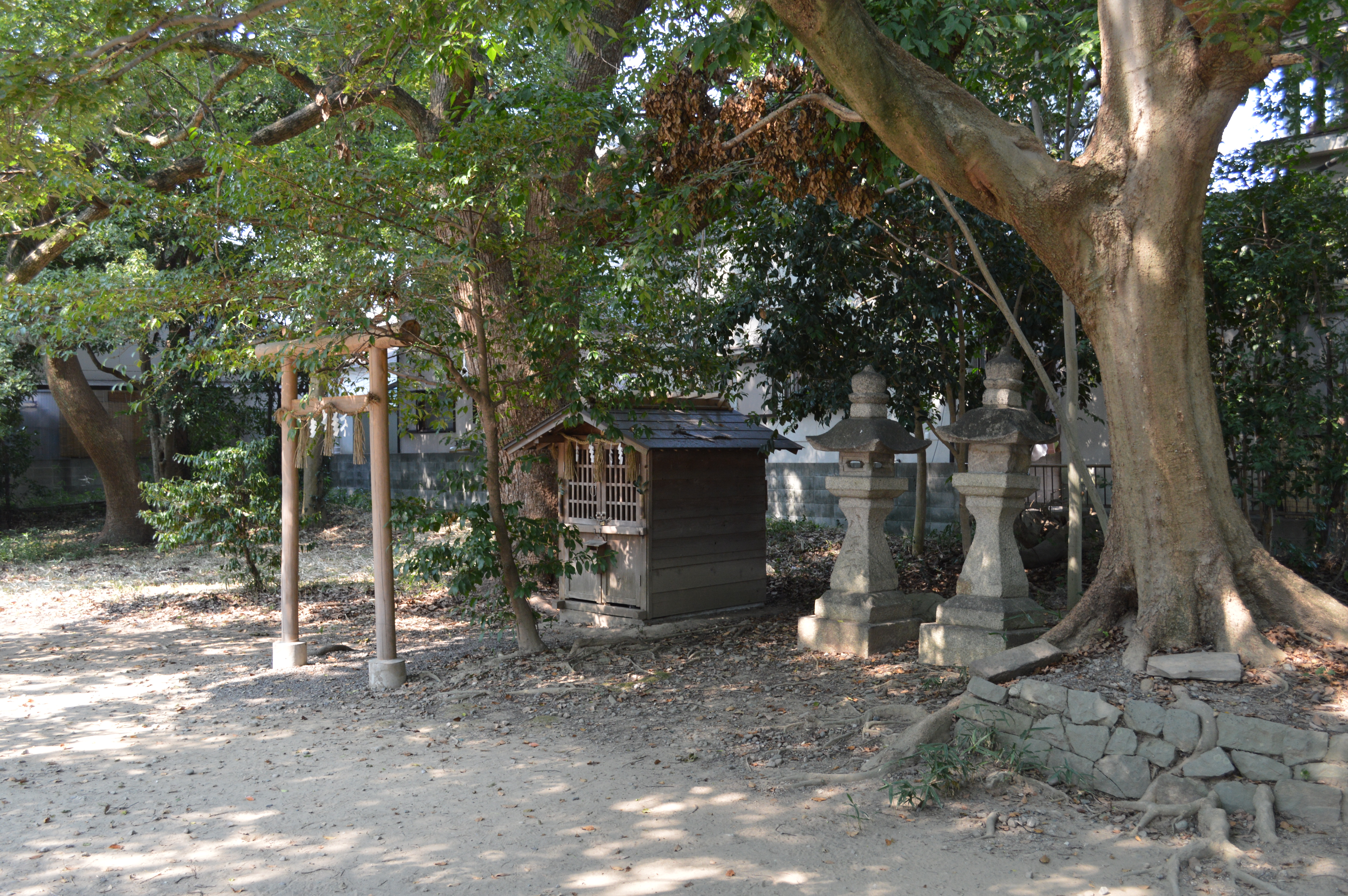 大屋都姫神社 境内社